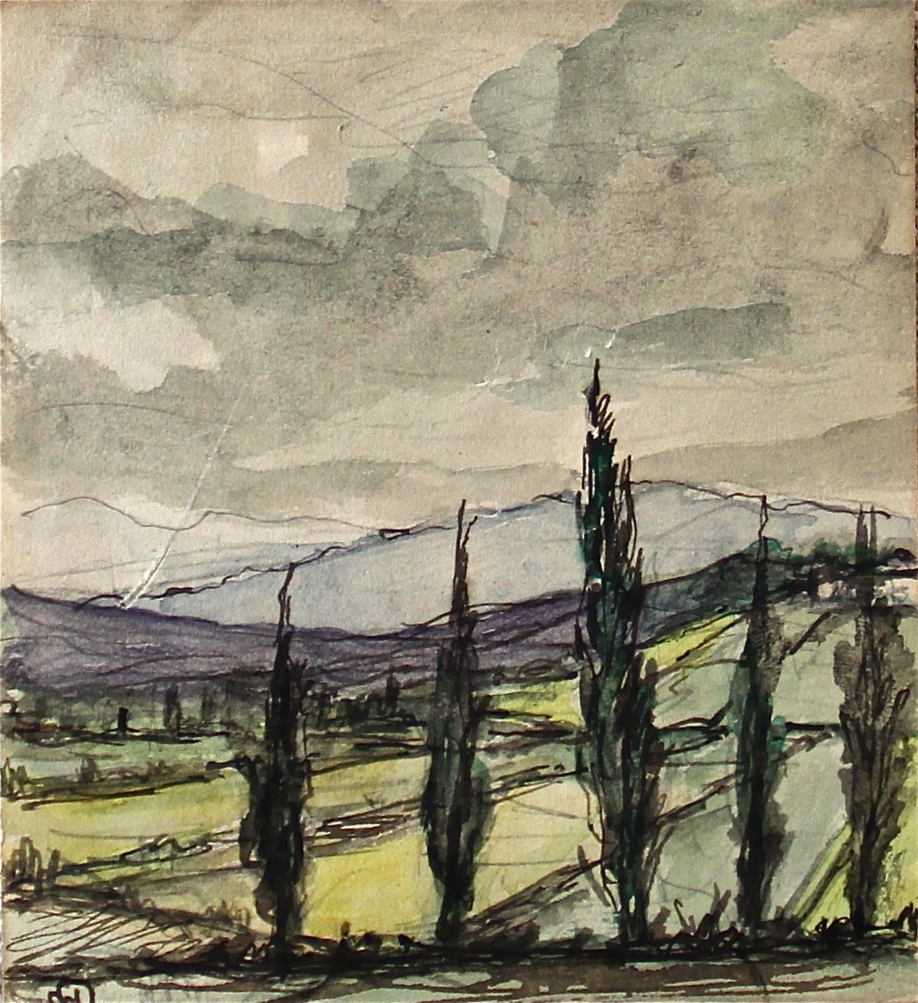 Paysage